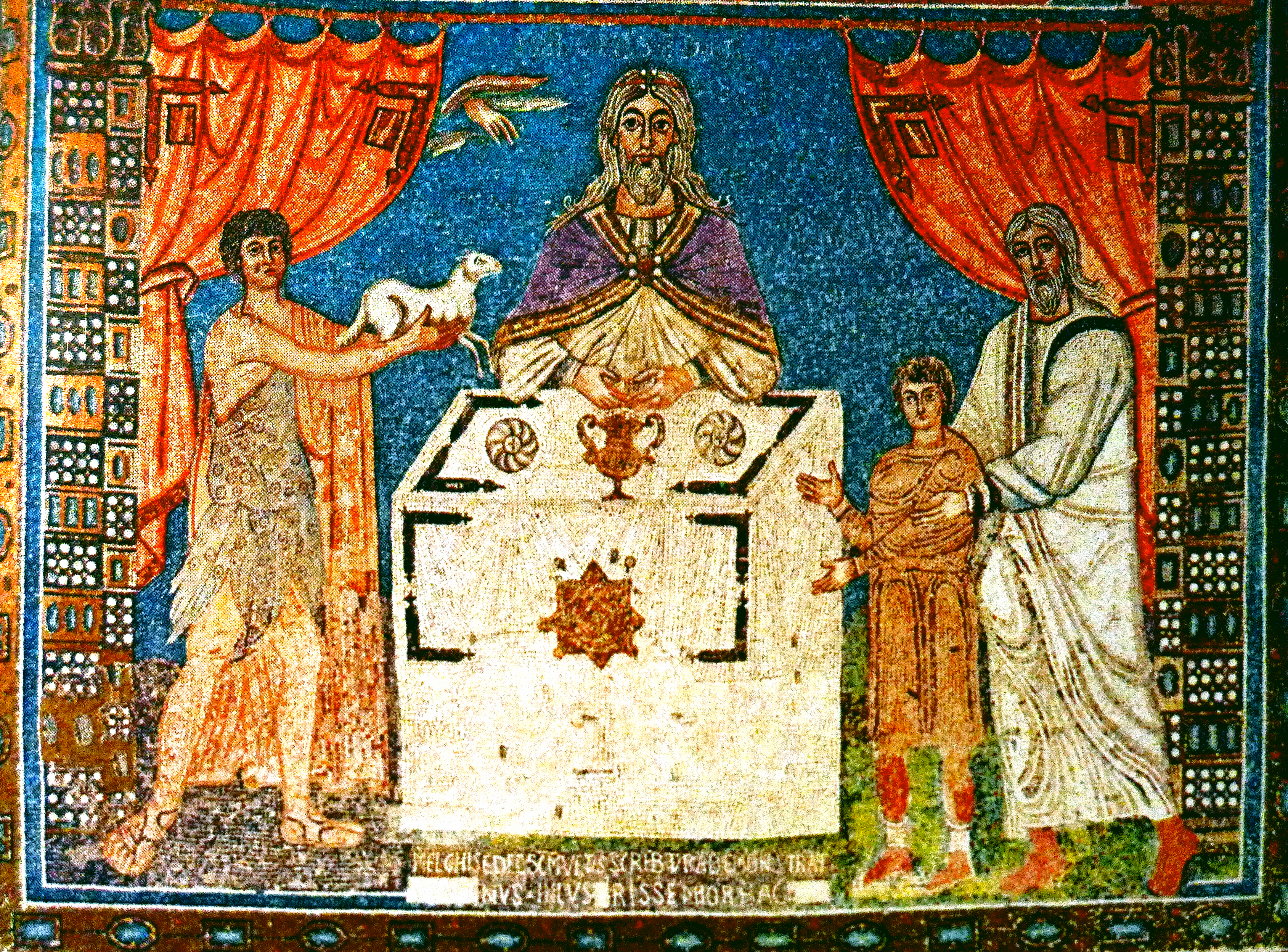 Ábrahám áldozata, Sant'Apollinare in Classe-templom (Ravenna)